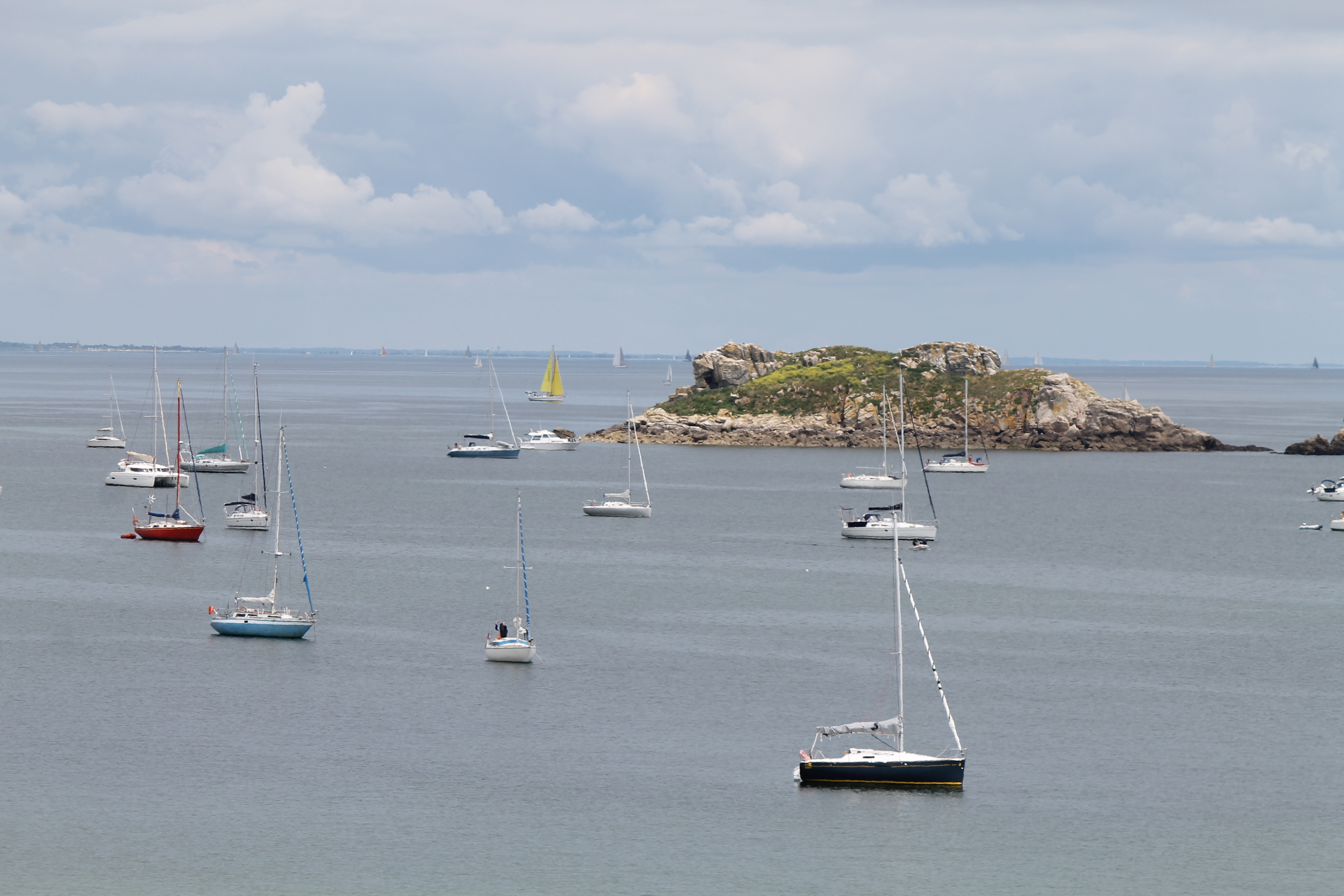 L'îlot d'Er Yoc'h, au large de l'île d'Houat (Morbihan).